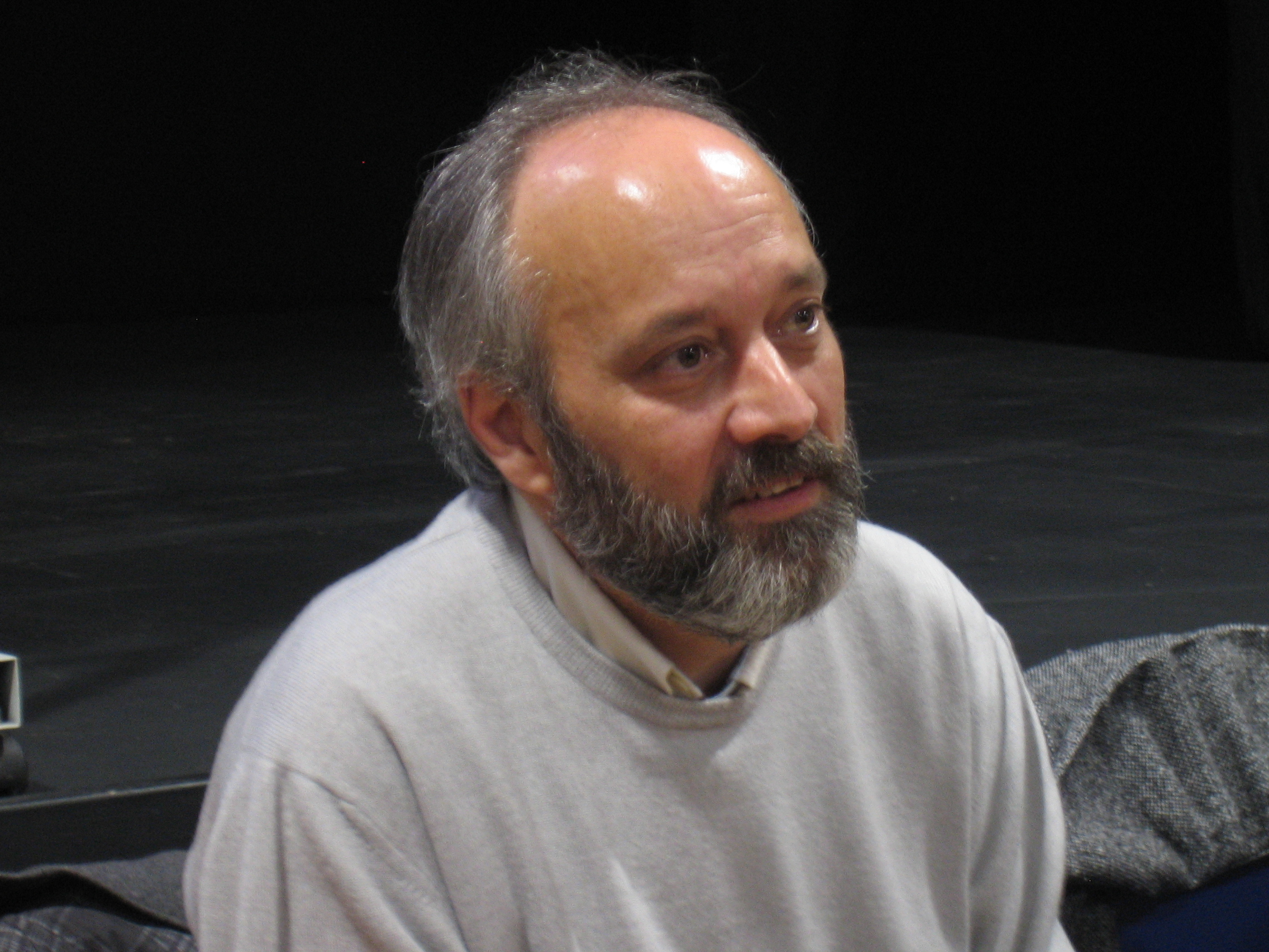 Carlos Pereira Martínez escritor e historiador na presentación do seu libro Xaime Quintanilla Martínez. Vida e obra dun socialista e galeguista ao servizo da República, escrito en colaboración con Ana Romero Masiá, e presentado no concello de Culleredo o 16 de marzo do 2012.